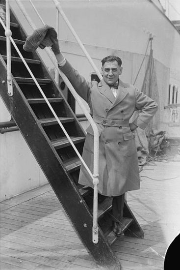 Tito Schipa (1888 – 1965), Italian tenor